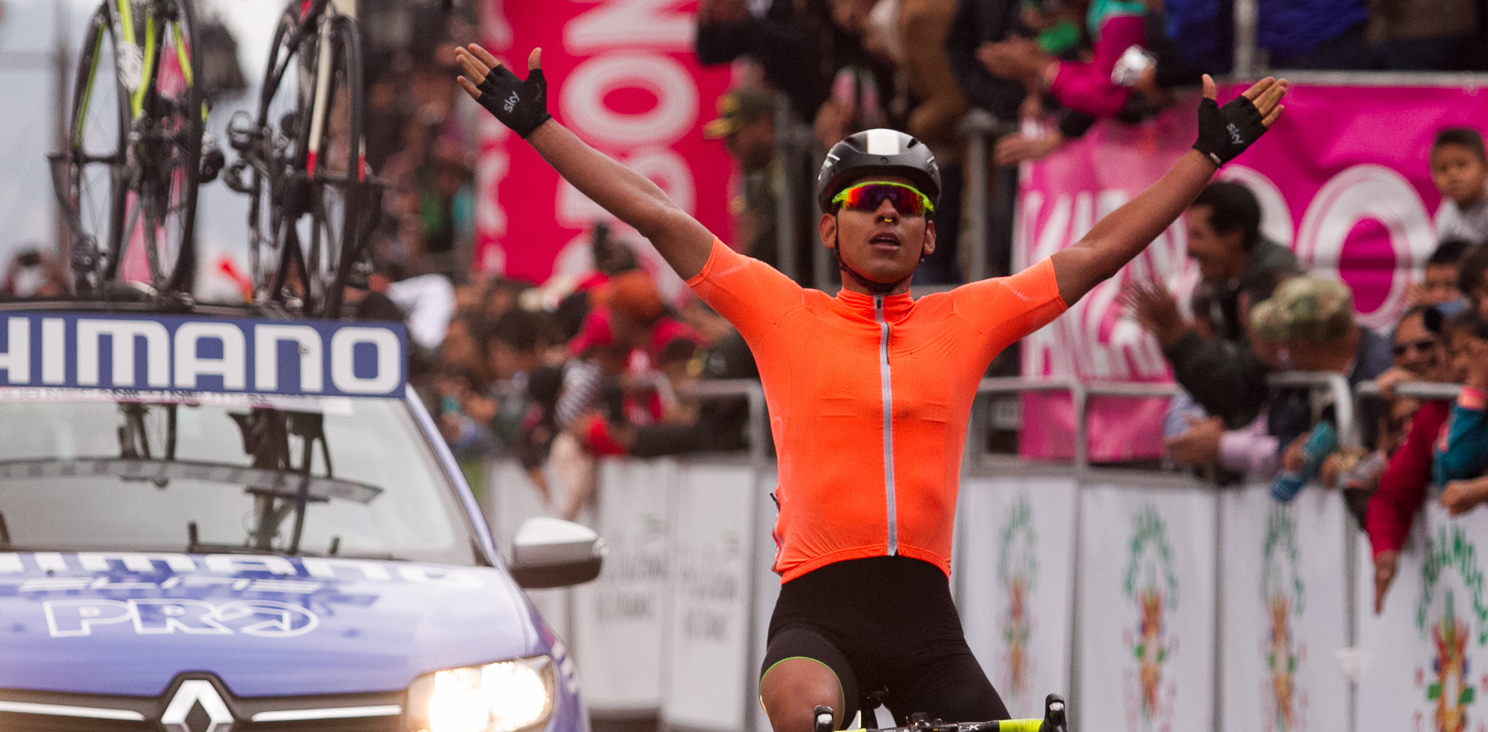 Elites Hombres Campeonatos Nacionales de Ruta Boyará 2016.